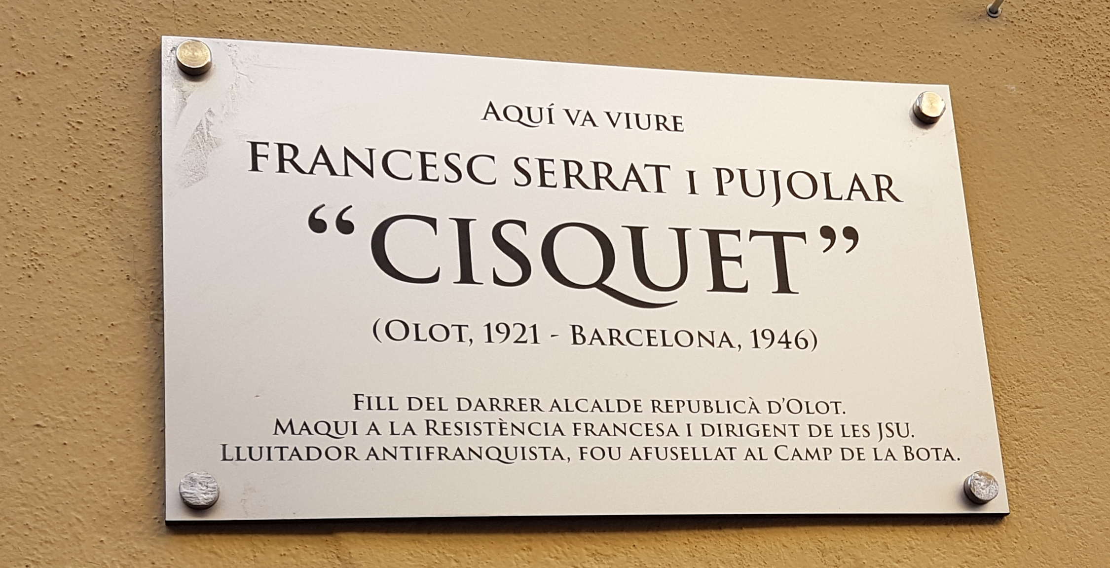 placa dedicada a Francesc Serrat Pujolar a Olot